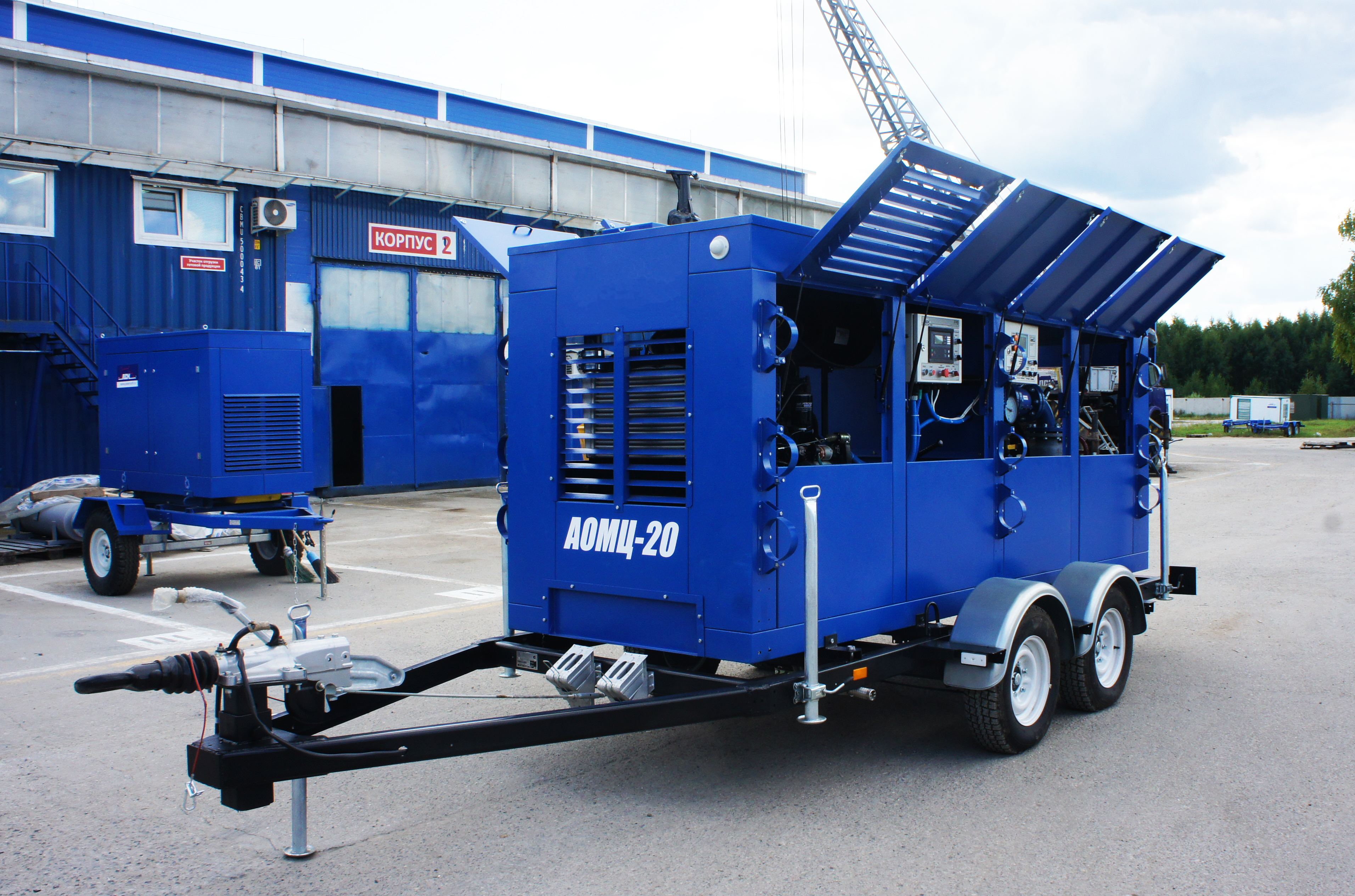 Разработка компании ПСМ для сезонной проверки теплотрасс